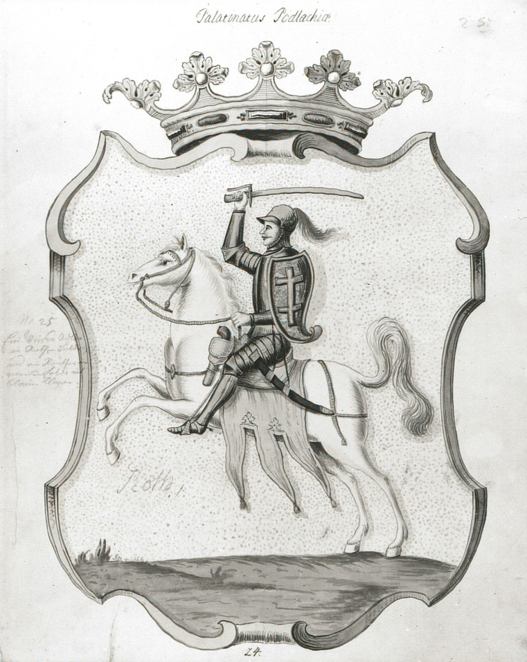 Беларуская (тарашкевіца): Герб Падляскага ваяводзтва (Padlašša) з Пагоняй (Pahonia)